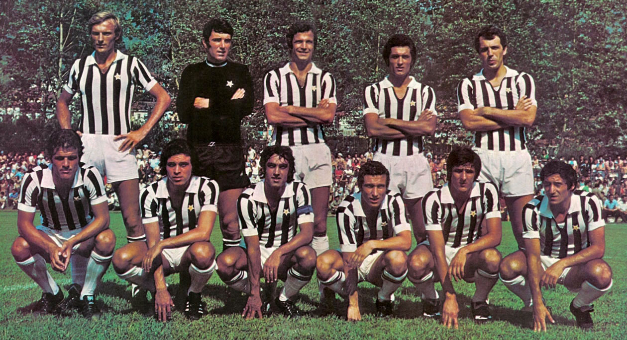 Una formazione della Juventus nella stagione 1974-75. Da sinistra, in piedi: F. Morini, D. Zoff, L. Spinosi, C. Gentile, R. Bettega; accosciati: F. Capello, F. Causio, P. Anastasi (capitano), G. Damiani, G. Scirea, G. Furino.